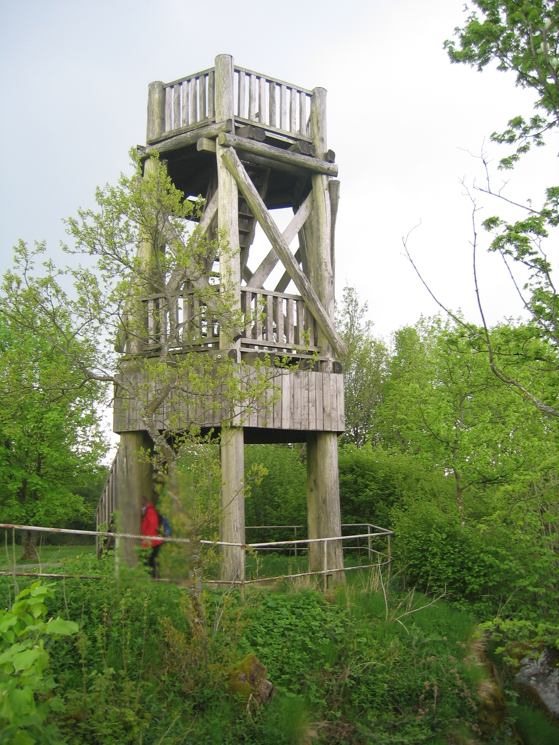 Der Aussichtsturm auf der Dietzenley